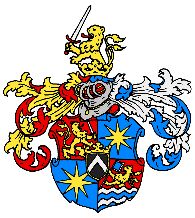 Wappen Freiherren von Löwenstern, wie 1676 von Kaiser Leopold I. im Reichsfreiherrenstand an diese verliehen